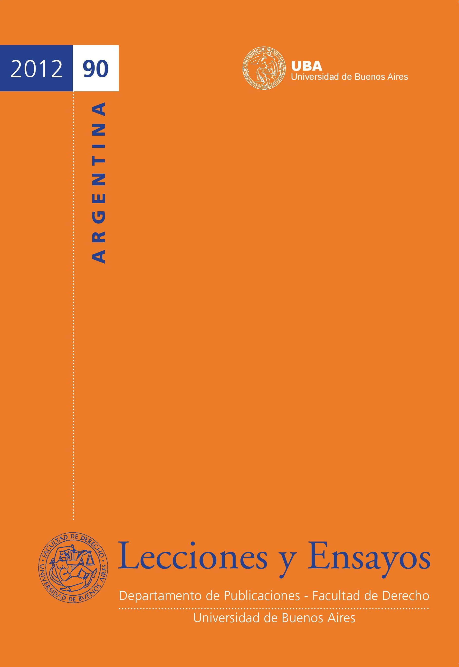 Tapa del número 90 de la Revista Lecciones y Ensayos